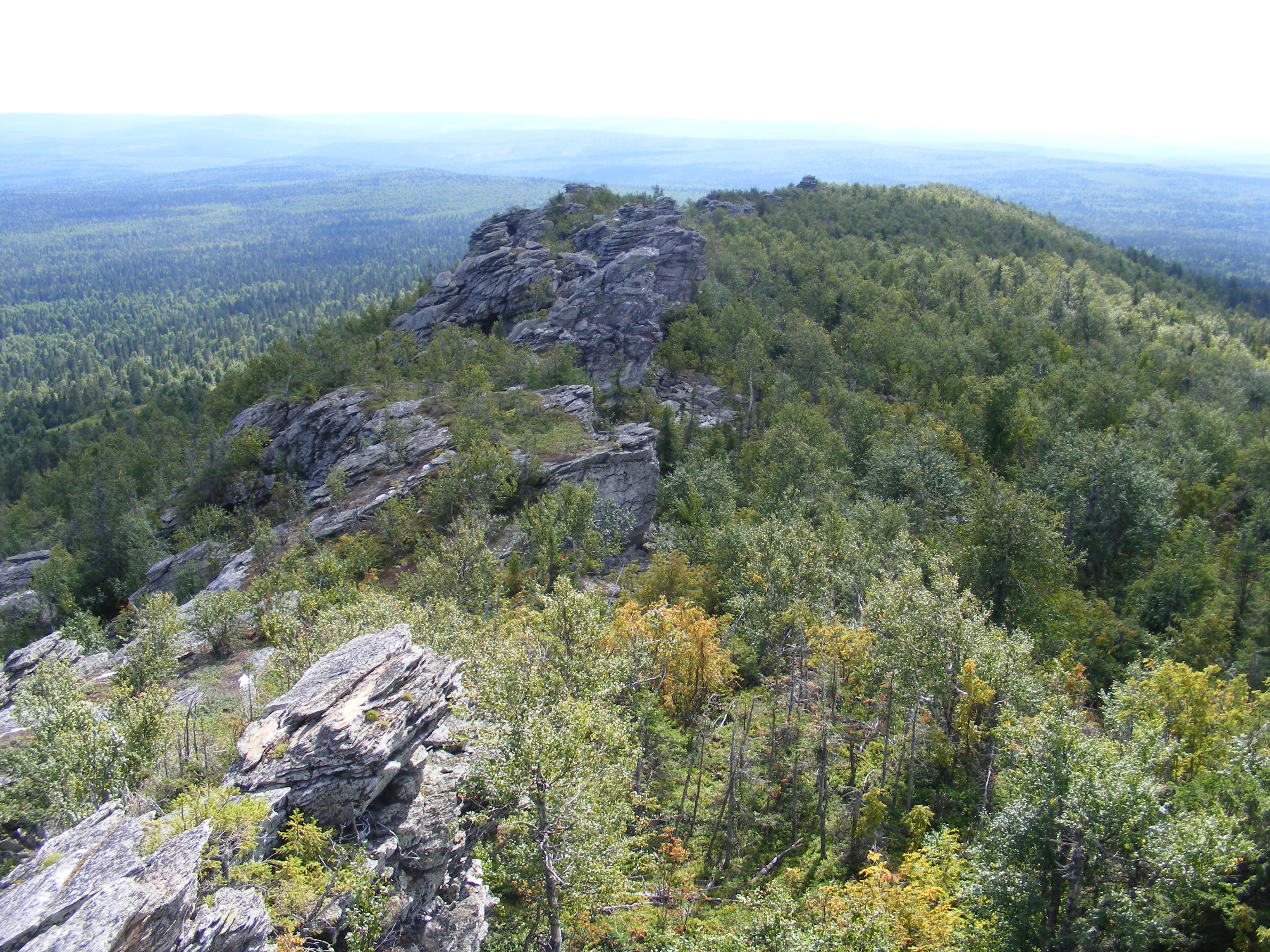 Басеги заповедник, Горнозаводский район This image is related to the protected area of Russia number 5900052